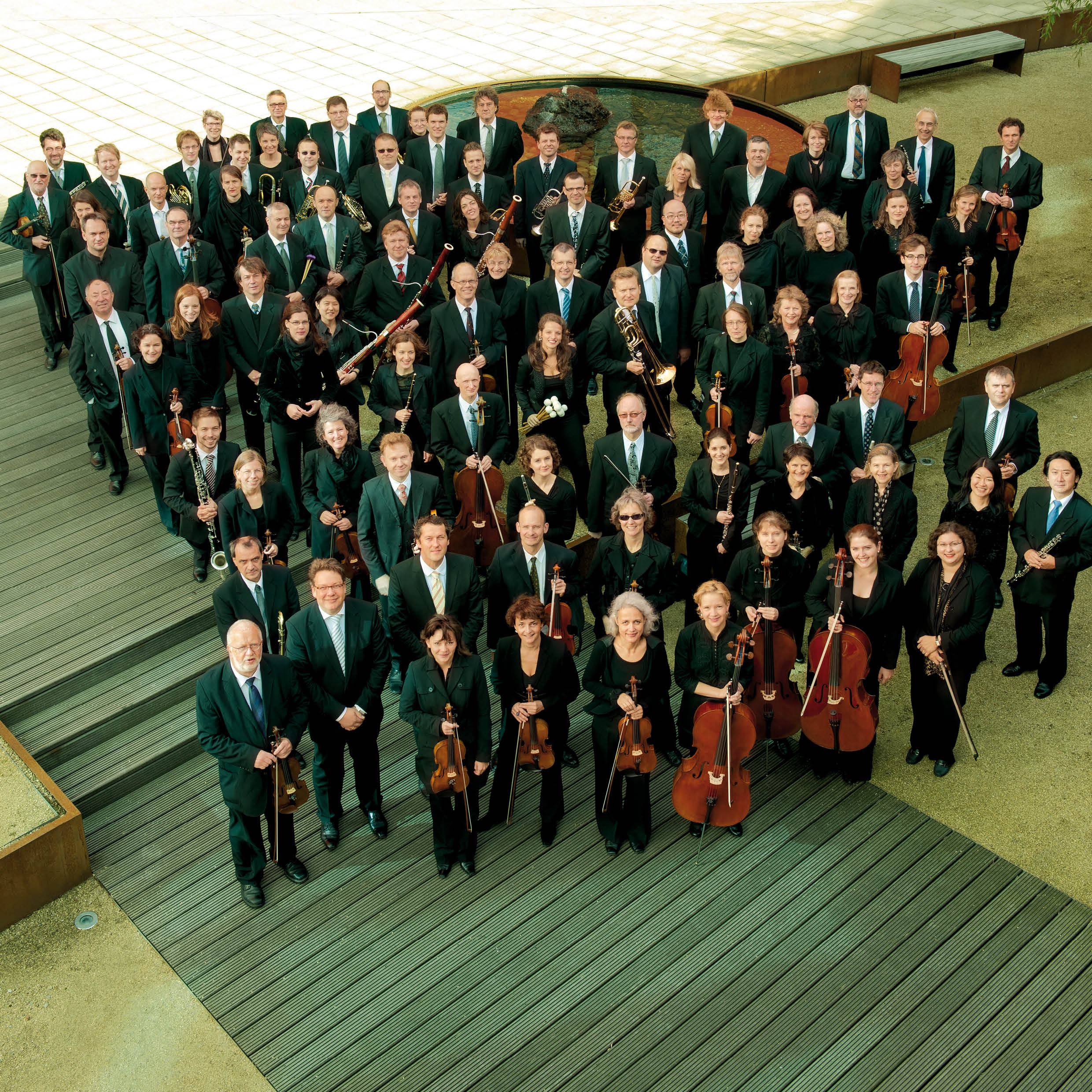 Orchesterfoto Saison 2011/2012